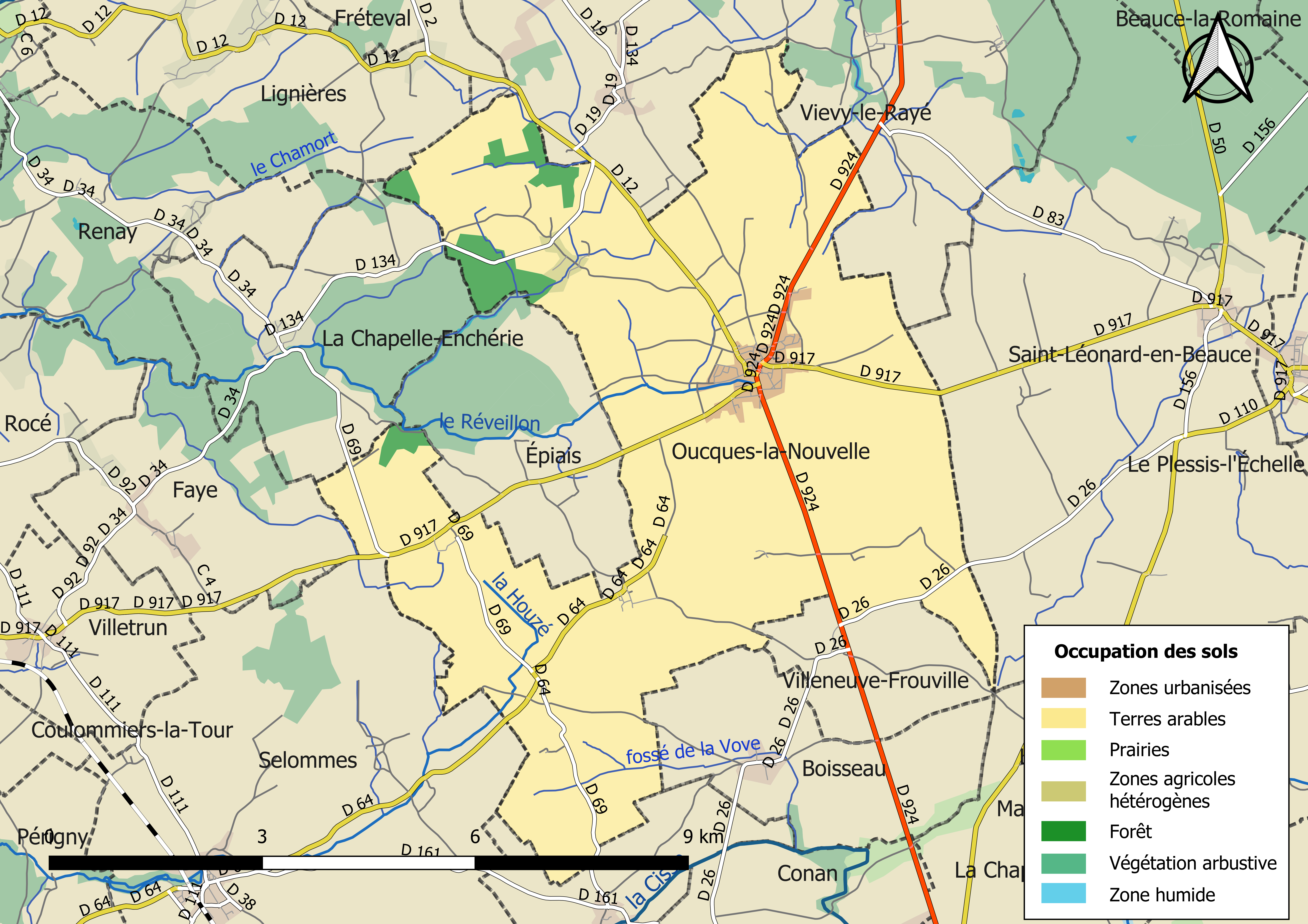 Carte des infrastructures et de l’occupation des sols en 2018 de la commune de Oucques-la-Nouvelle (France).